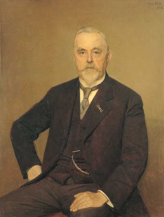 Schilderij van Jan Veth (1864-1925) uit 1916. Schilderij hangt in het Schielandshuis in Rotterdam